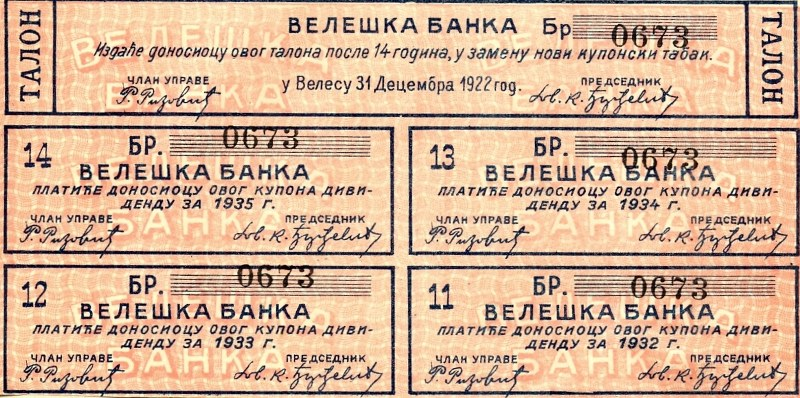 Акция на Велешката банка.